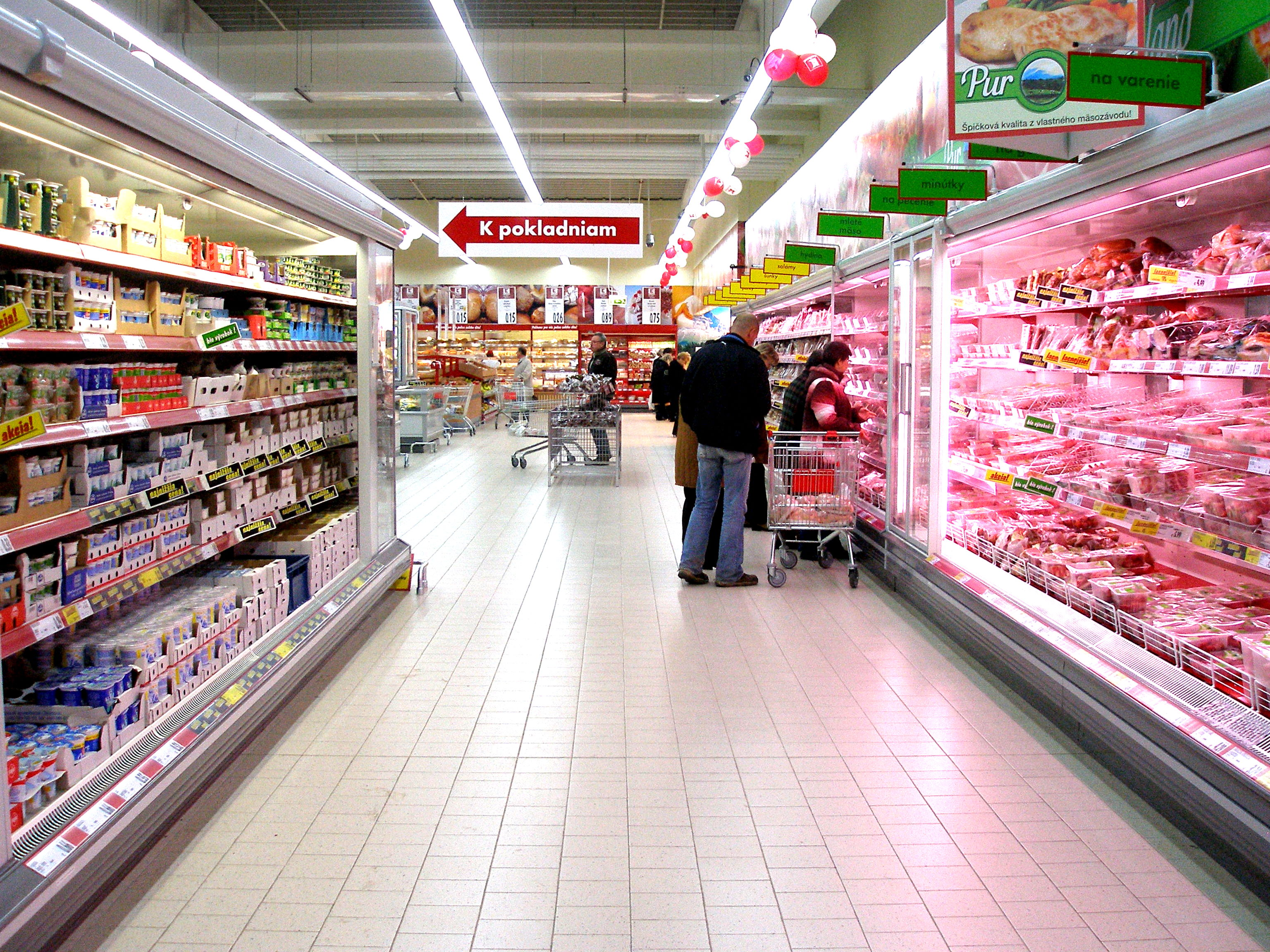 Supermarket Kaufland Prešov - interiér, sídlisko Sekčov. Otvorený 12.11.2009.